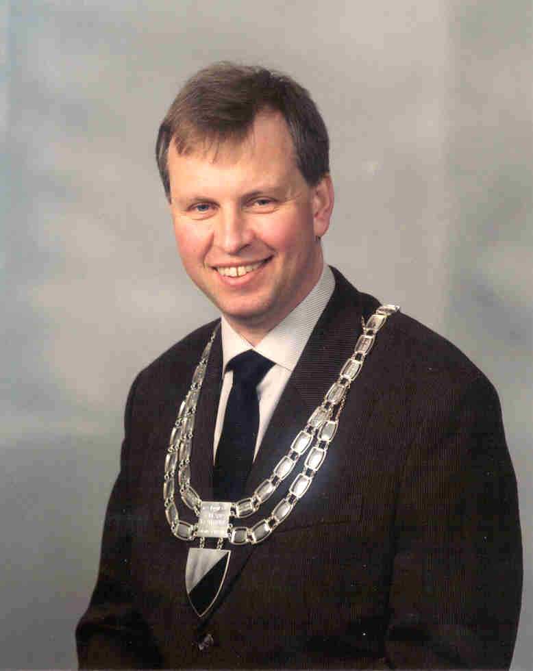 Mayor Hallgeir Grøntvedt of Ørland, Norway